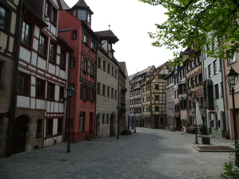 Die Weißgerbergasse in Nürnberg; Blickrichtung Westen